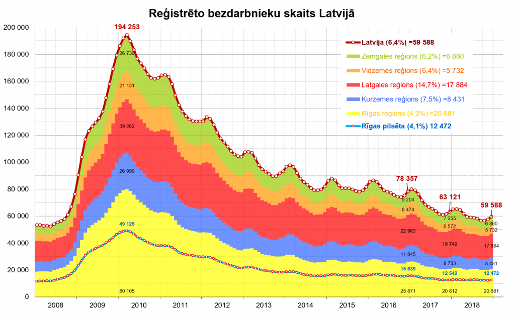 Bezdarba dinamika LV reģionos